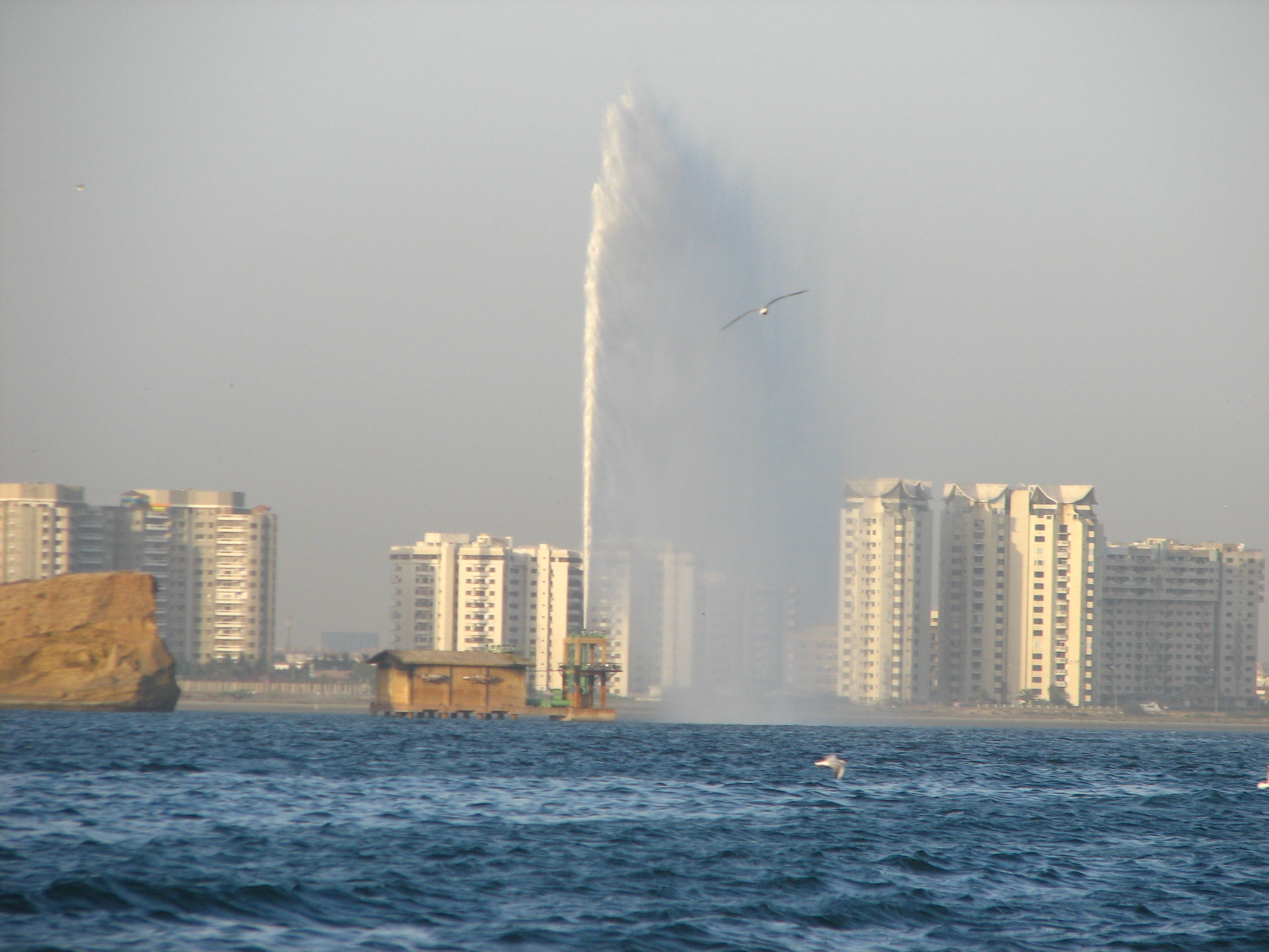 Clifton Beach Karachi